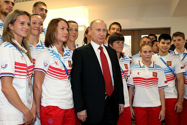 Встреча со спортсменами студенческой сборной команды Российской Федерации.